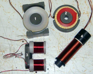 Shembull i aplikimit te feriteve